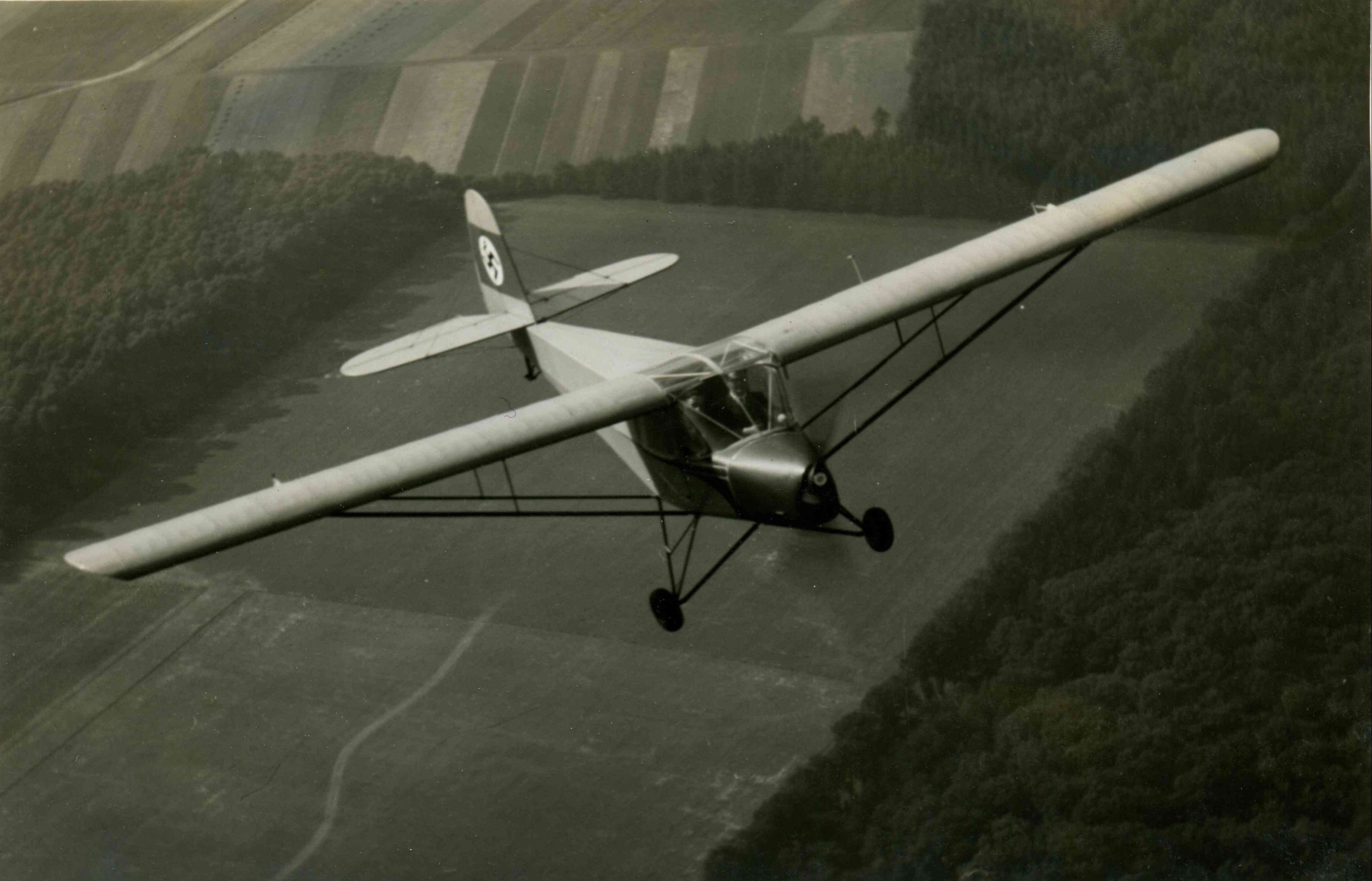 Foto der Fieseler Fi 253 “Spatz“, ein Schul-, Sport- und Reiseflugzeug als abgestrebter Hochdecker in Gemischtbauweise ausgeführt. Der Rechteckflügel war eine bespannte Holzkonstruktion, der kastenförmige Rumpf war eine geschweißte Stahlrohrkonstruktion mit Stoffbespannung. Zwei Sitze nebeneinander angeordnet. Motor: Zündapp 9-092 mit 50 PS. Entwickelt und gebaut bei dem Fieseler Flugzeugbau Kassel.